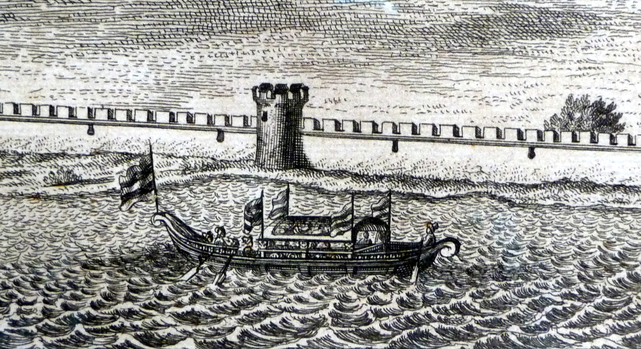 Begleitschiff des Bucentaur. (Ausschnitt aus einem Kupferstich von Michael Wening, der um 1700 entstand und Schloss Possenhofen zeigt.)